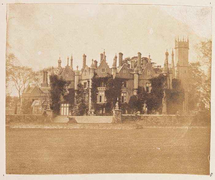 Ffotograffydd/Photographer: Mary Dillwyn (1816-1906) Dyddiad/Date: 1854 Cyfeiriad/Reference: viv00098 (pb02376/55) Rhif cofnod / Record no.: 3590001 Rhagor o wybodaeth am Ffotograffiaeth Gynnar Abertawe yn Llyfrgell Genedlaethol Cymru More information about Early Swansea Photography at the National Library of Wales